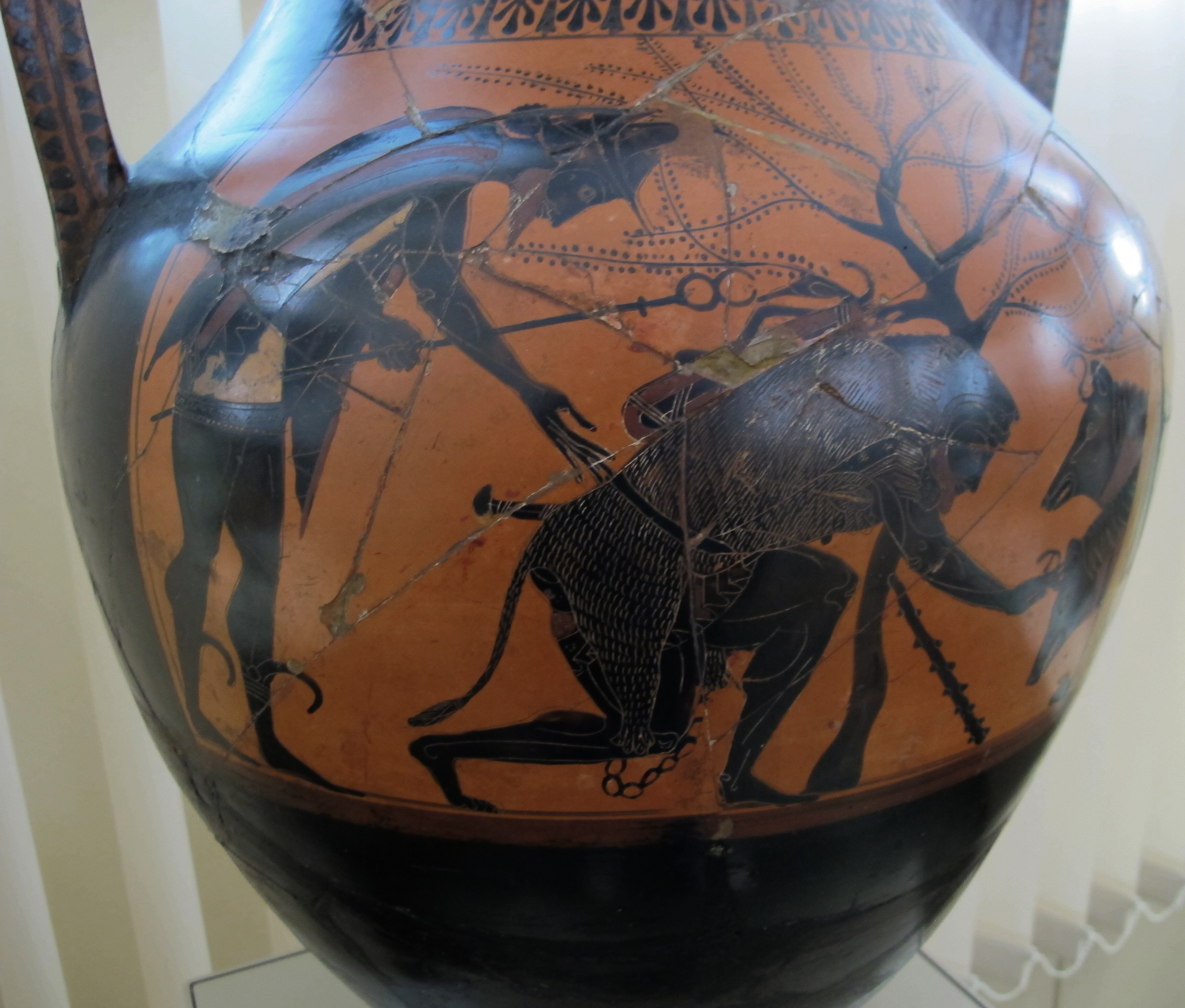 Pittore andokides, anfora a figure nere con eracle e cerbero, 530 ac. ca